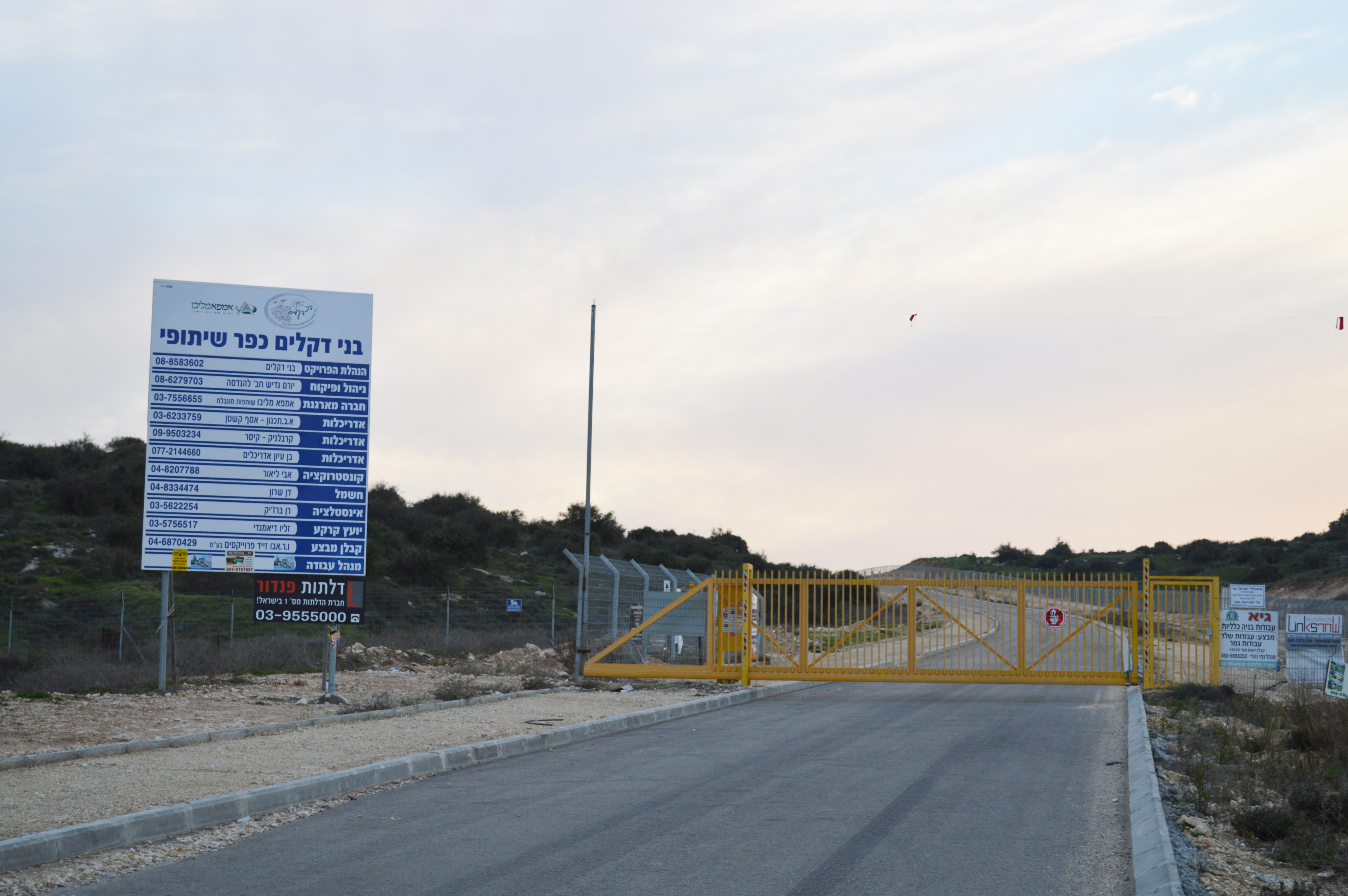 הכניסה לישוב בני דקלים